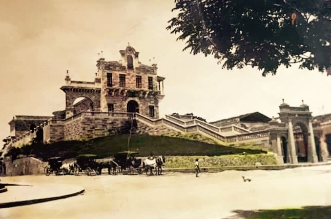 Fotografía del Calvario en 1940, cuando era un museo.